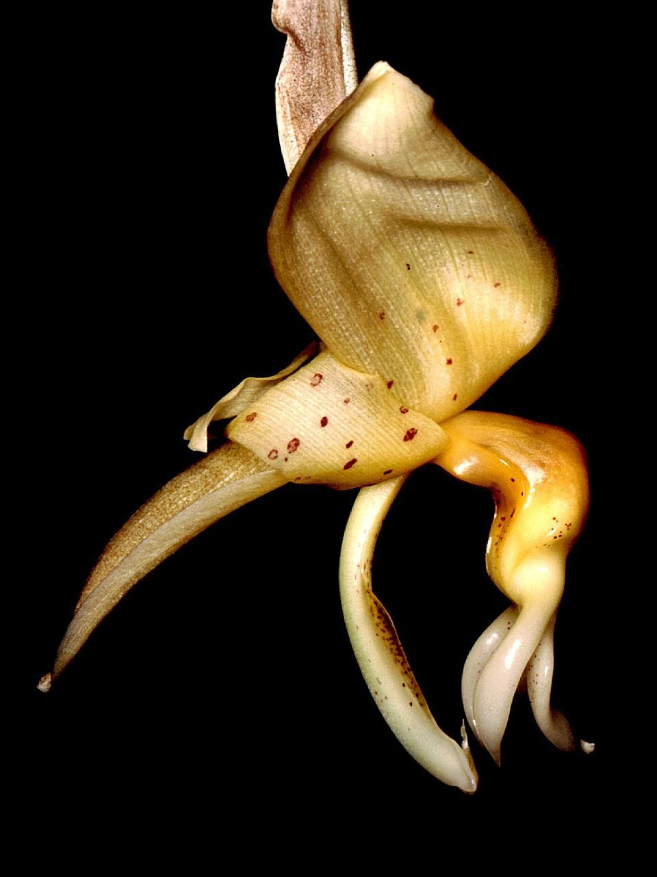 Stanhopea maculosa